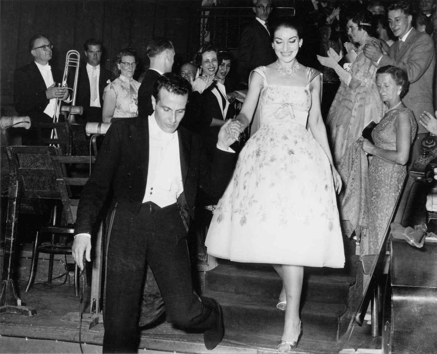 Optreden van Maria Callas in het Concertgebouw begeleid door dirigent Nicola Rescigno, 11 juli 1959 Foto Ben van Meerendonk / AHF, collectie IISG, Amsterdam